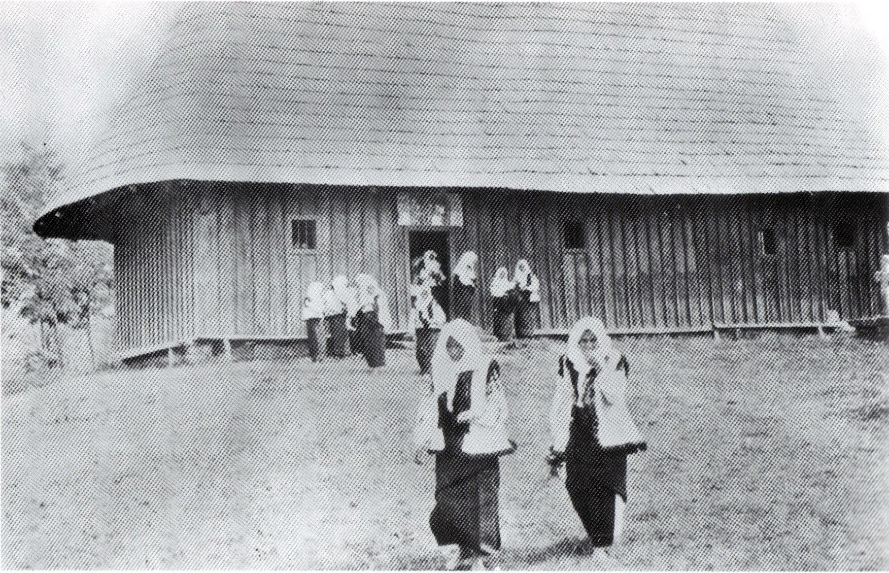 Biserica de lemn din Calafindești, Suceava County, Romania